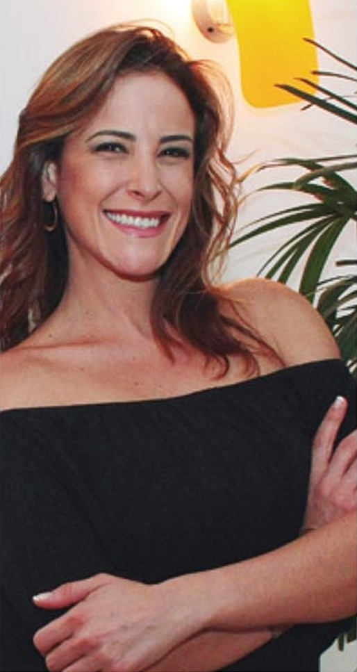 Juliana Lopes Leite (Brasília, 9 de julho de 1980) é uma atriz, modelo e promoter brasileira, conhecida, primeiramente, por sua participação na quarta edição do reality show brasileiro Big Brother Brasil no ano de 2004, e, posteriormente, por atuações em novelas e filmes. Foto tirada durante evento de moda em Brasília.